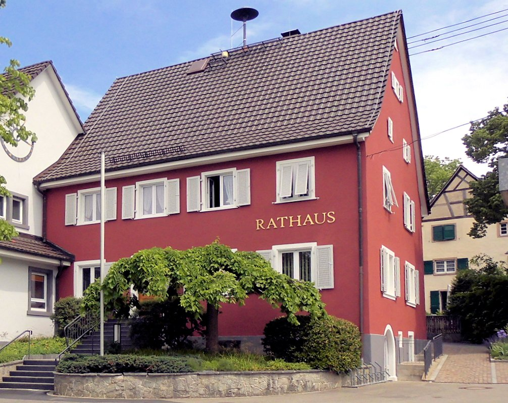 Rathaus der Gemeinde Wittlingen, Landkreis Lörrach, Baden-Württemberg